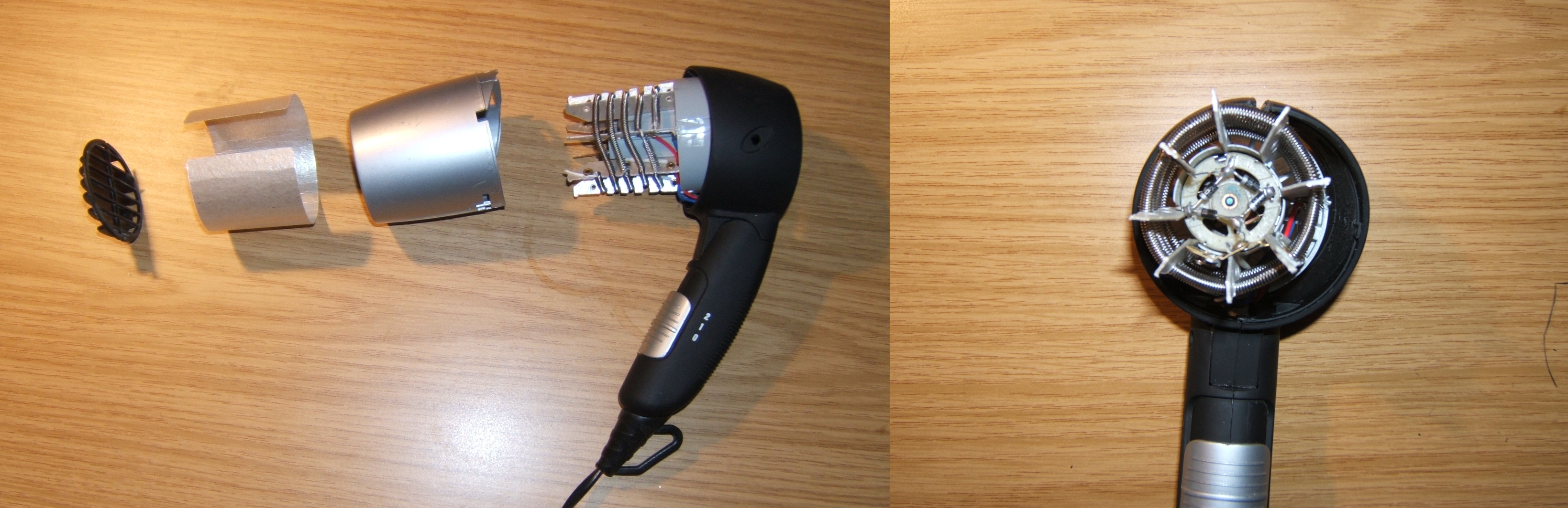 Seitenansicht der Bauteile und Frontansicht eines geöffneten Haartrockners